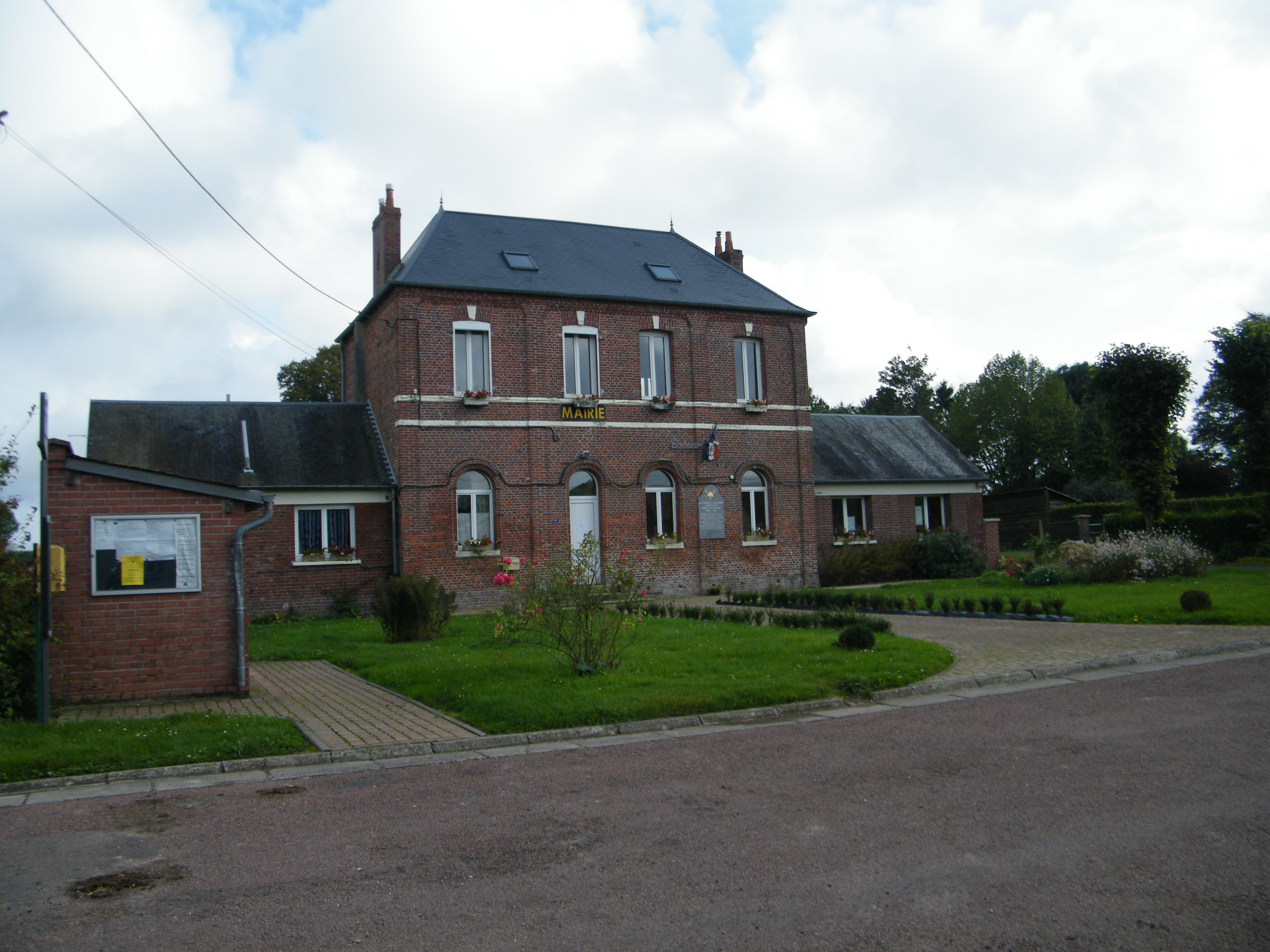 Mairie-école.